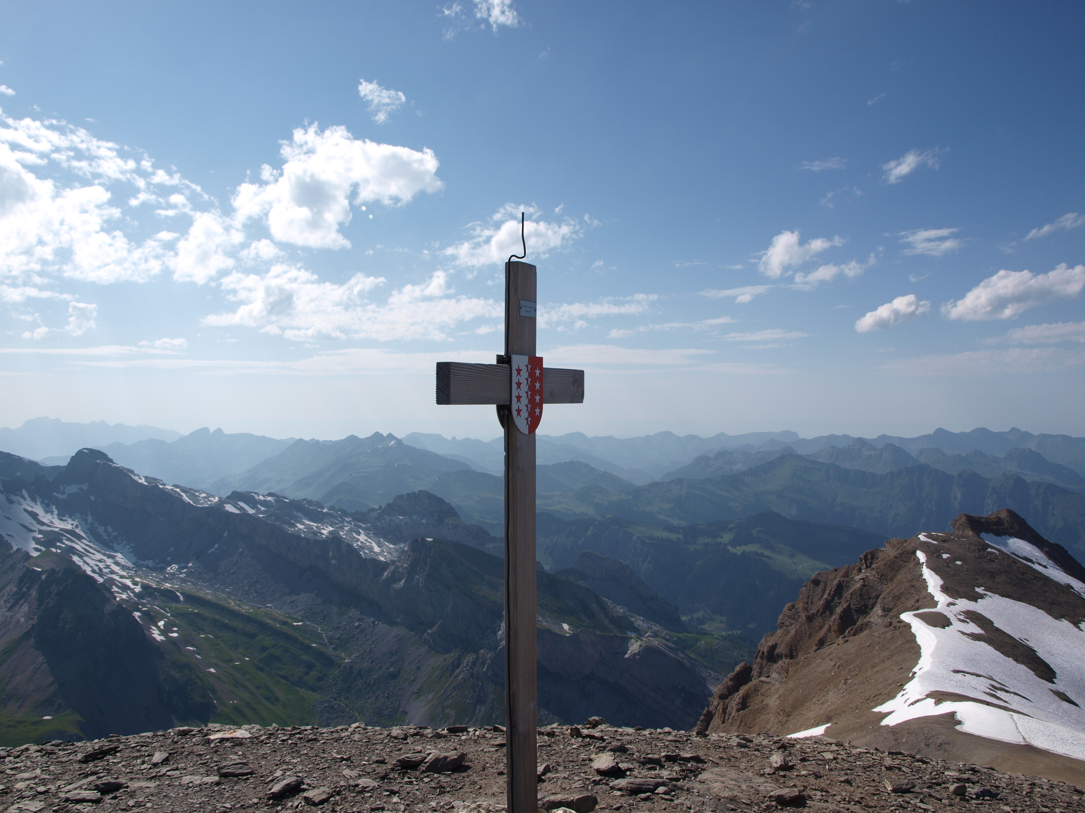 Vue des Alpes bernoises, depuis le sommet de l'Arpelistock